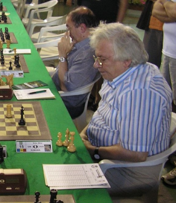 GM Mihai Suba (Romania)